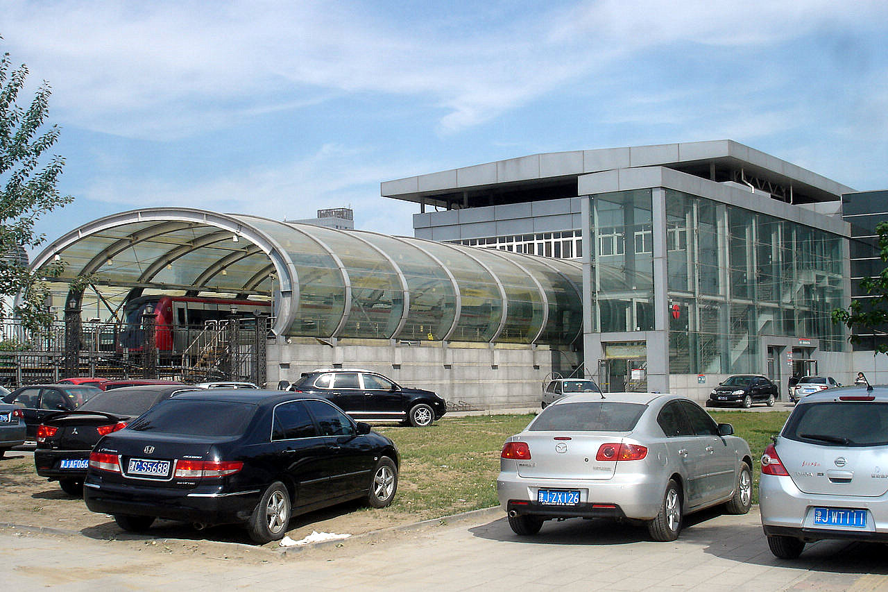 中文（中国大陆）: 双林站（地铁一号线）